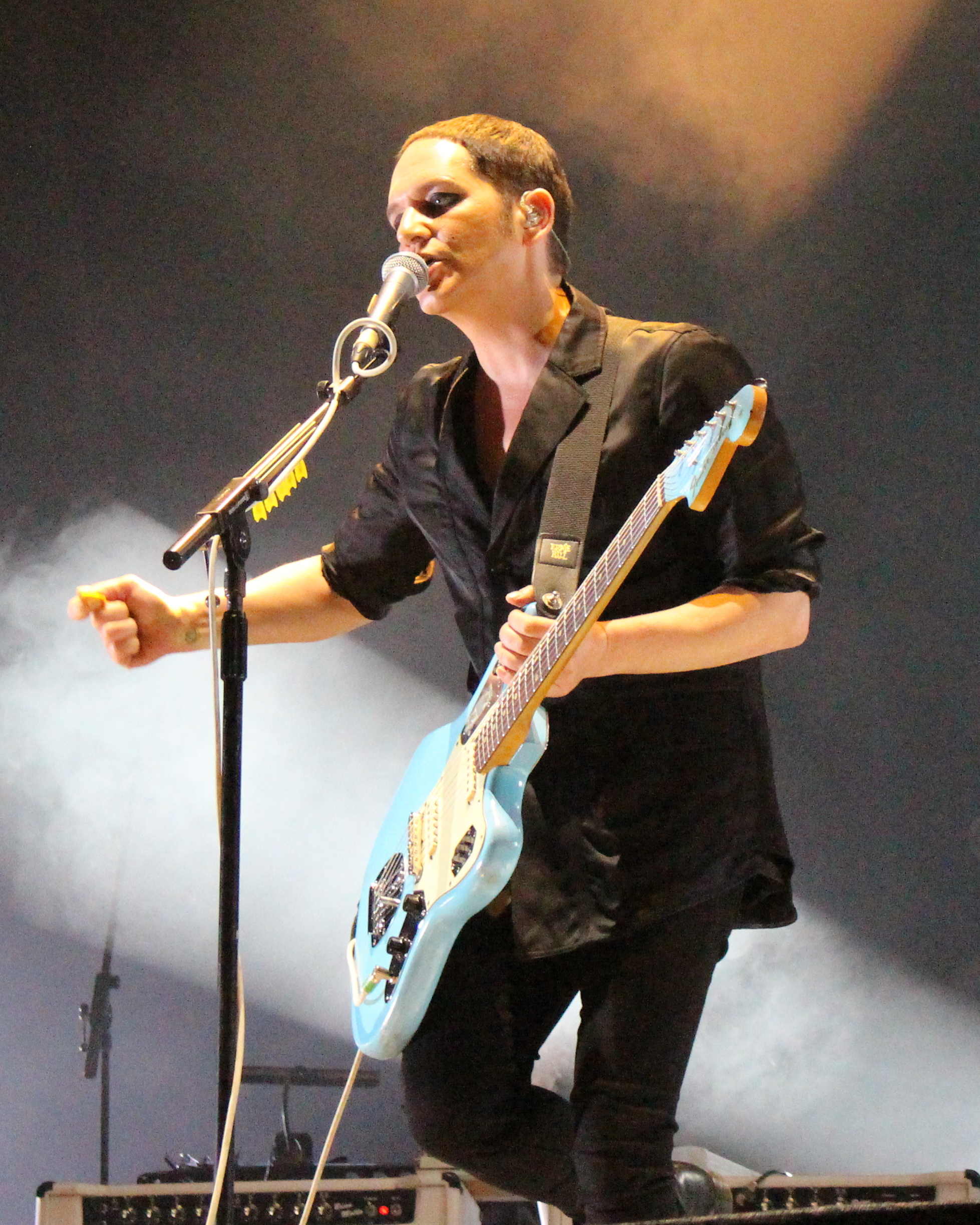 Festivalsommer This photo was created with the support of donations to Wikimedia Deutschland in the context of the CPB project "Festival Summer".